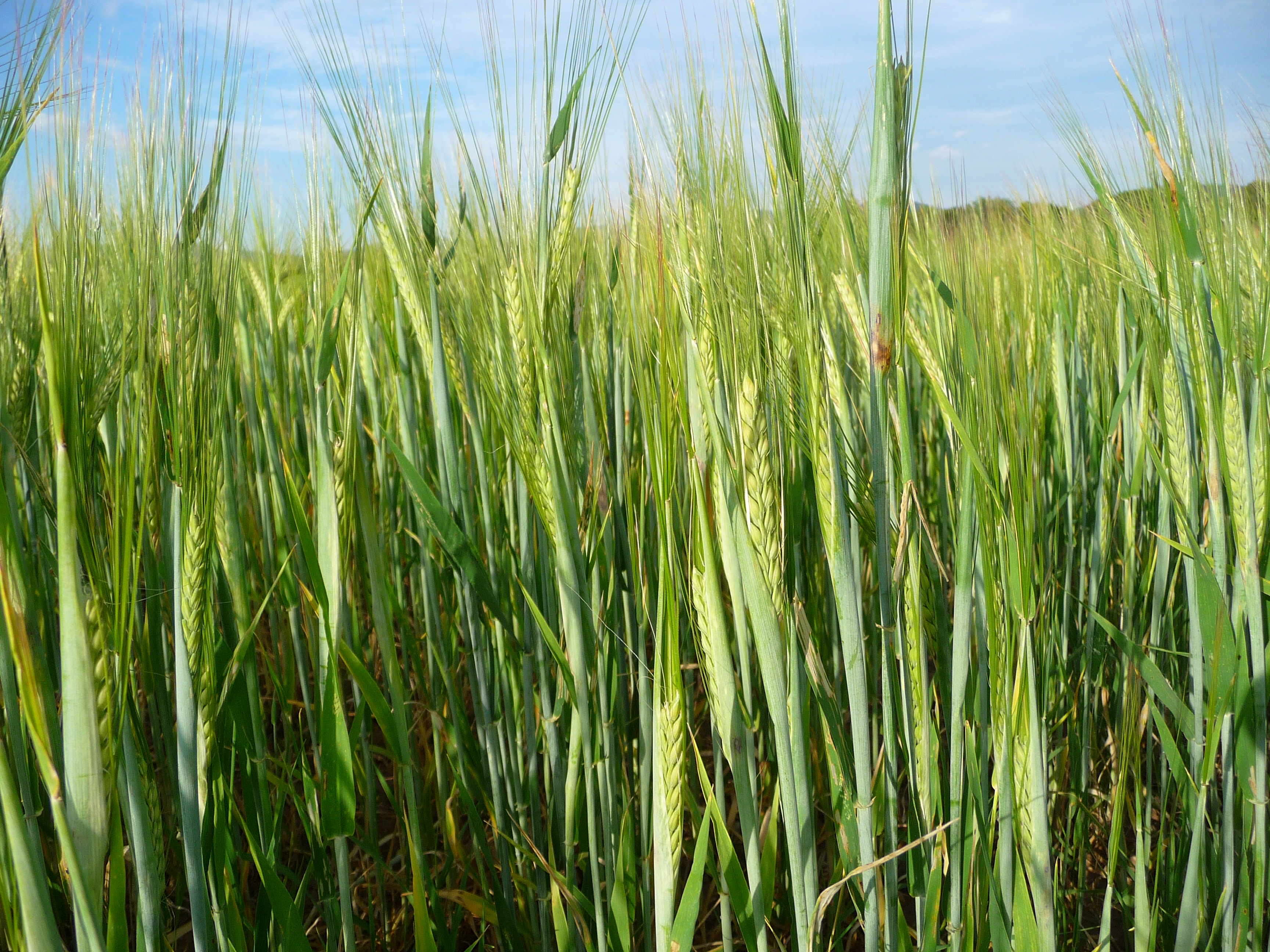 Gerstenfeld (Hordeum vulgare) Mitte Juni 2009 in Heidelberg-Wieblingen